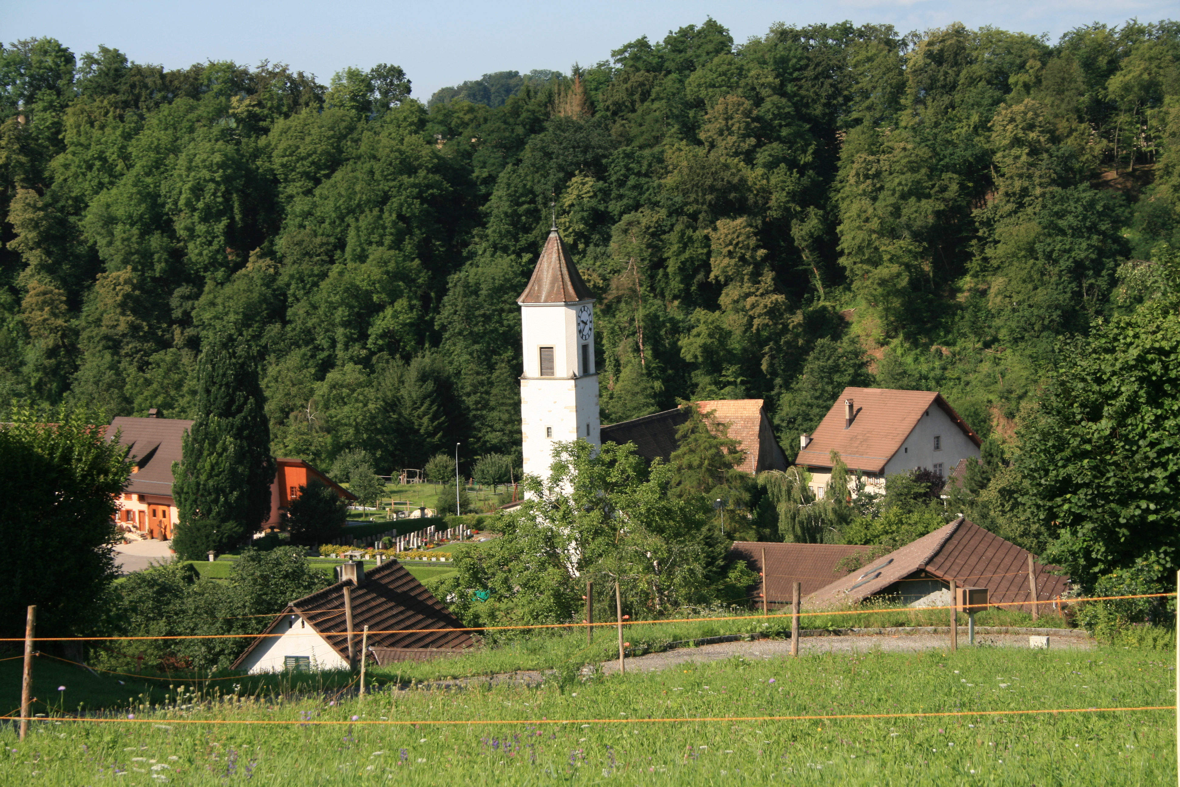 Ref. Kirche Tegerfelden, Aargau, Schweiz